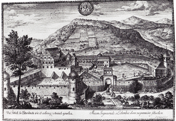 Kupferstich von Schloss Eschenbach "wie es anfangs erbauet gewesen"